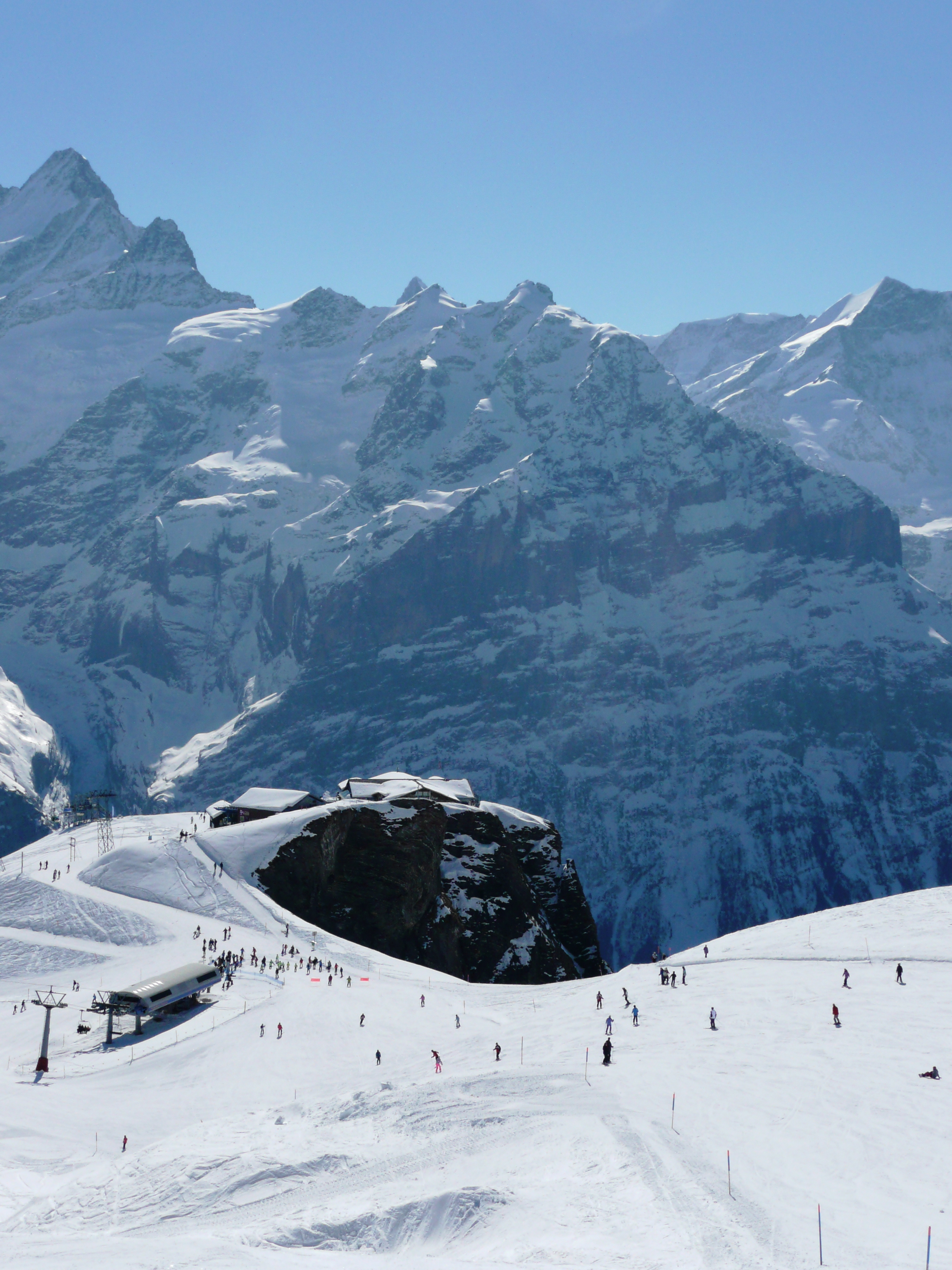 Schreckfeld